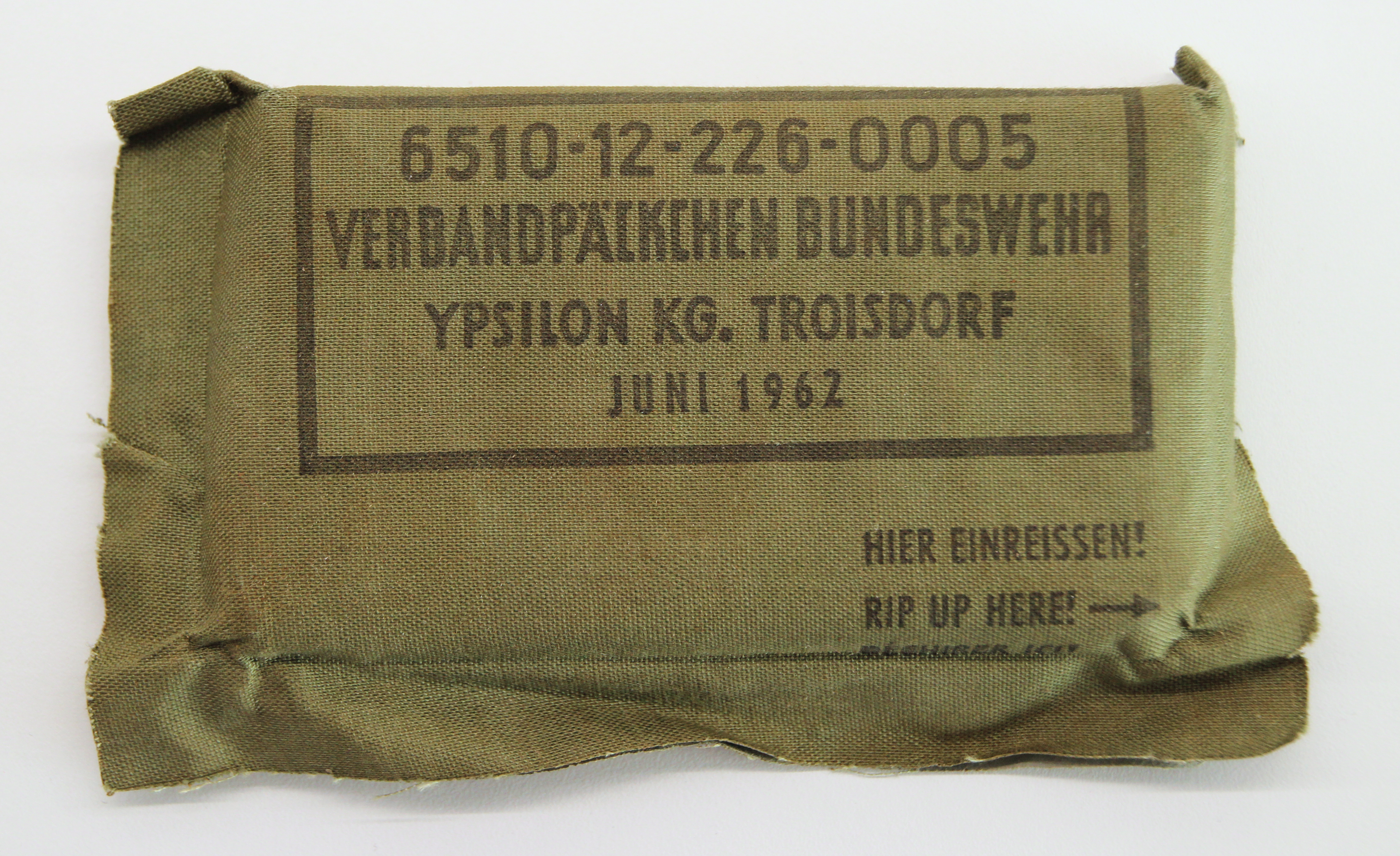 Bildinhalt: Verbandpäckchen der Bundeswehr aus dem Jahr 1962, ungeöffnet. Aufnahmeort: Frankfurt am Main, Deutschland